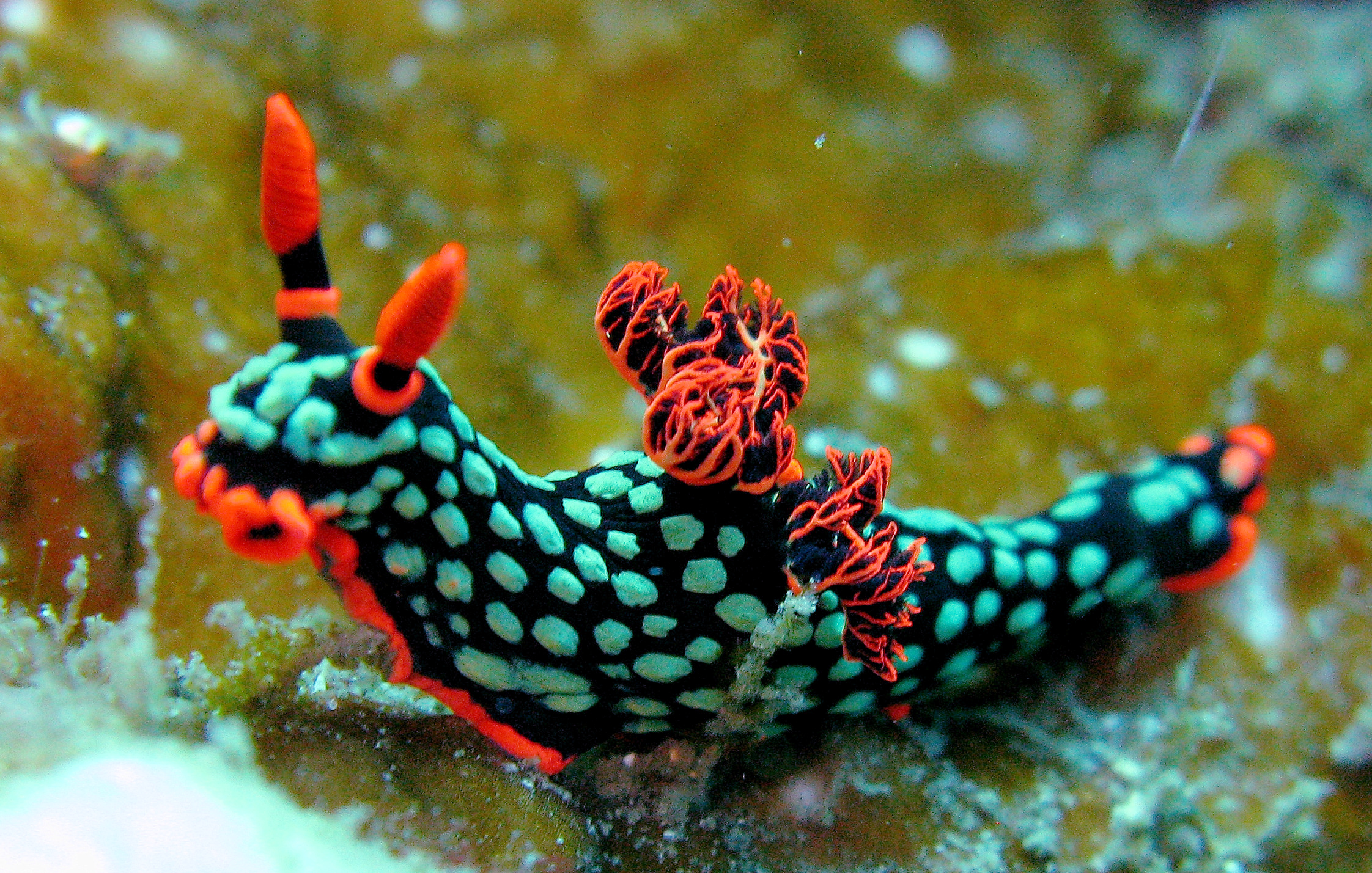 Nembrotha kubaryana en Lembeh, Indonesia